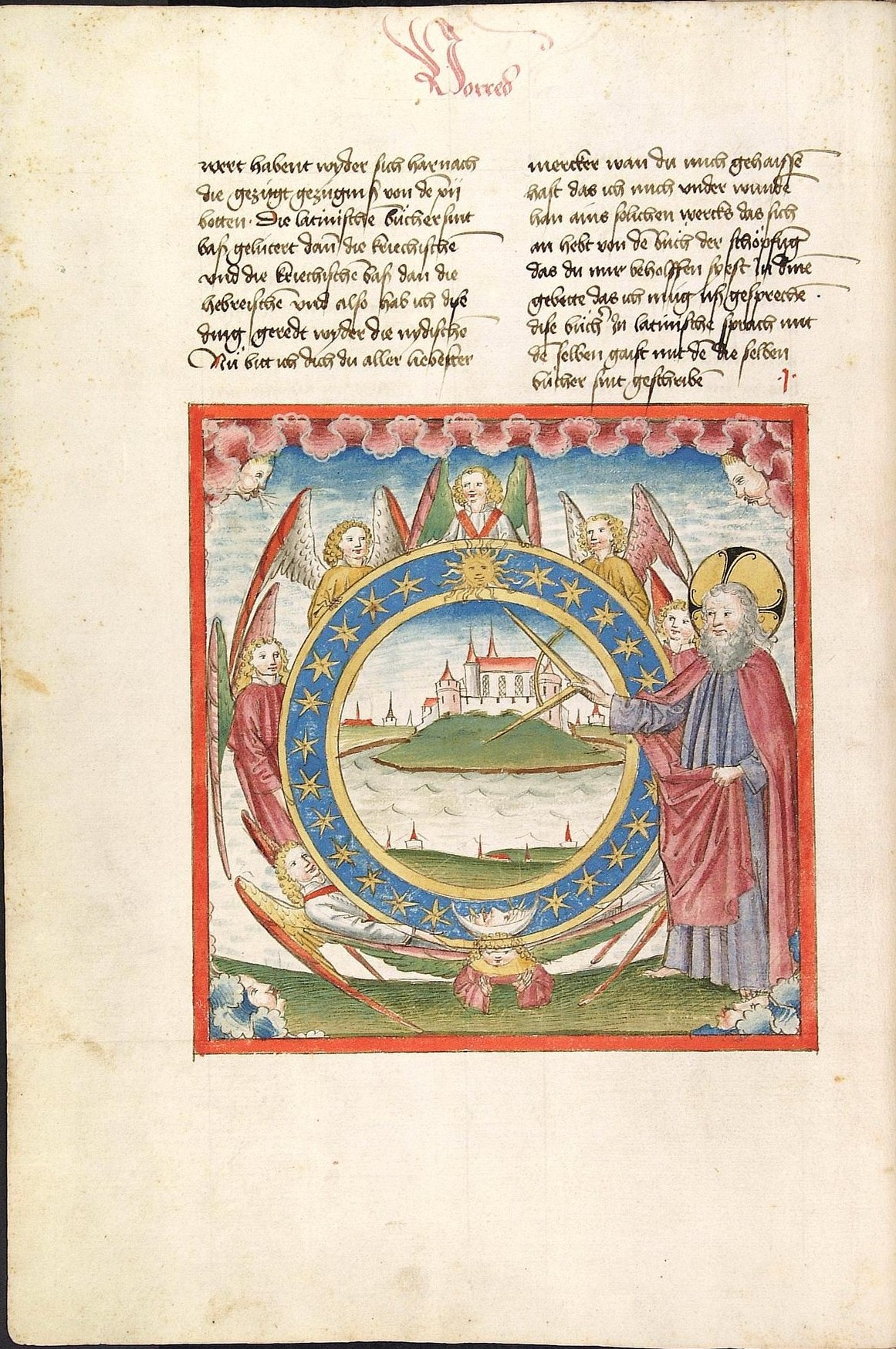 Codex Palatinus germanicus 16, Blatt 9v - Bibel, Altes Testament, Genesis: Der Schöpfergott vermisst mit einem Zirkel die Erde. (Cpg 16 = Bibel AT, deutsch, Bücher Mose, Josua, Richter, Ruth)